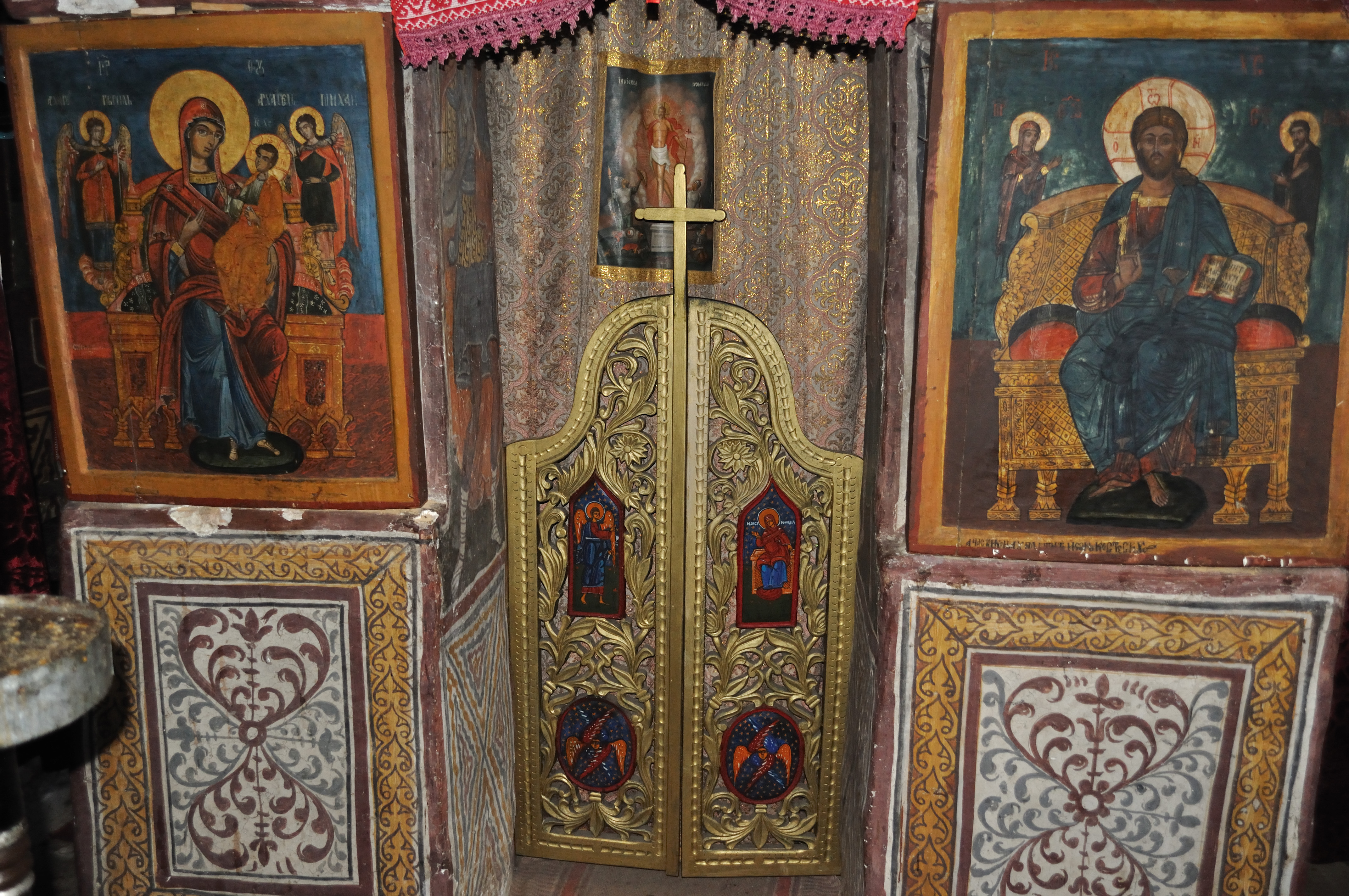 Biserica de lemn „Sf.Nicolae”, sat Bărbătești, cătun Poeni, jud.Vâlcea